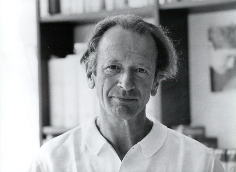 Luc Ciompi